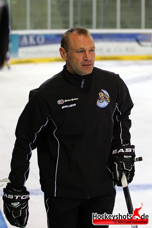 Dan Ratushny